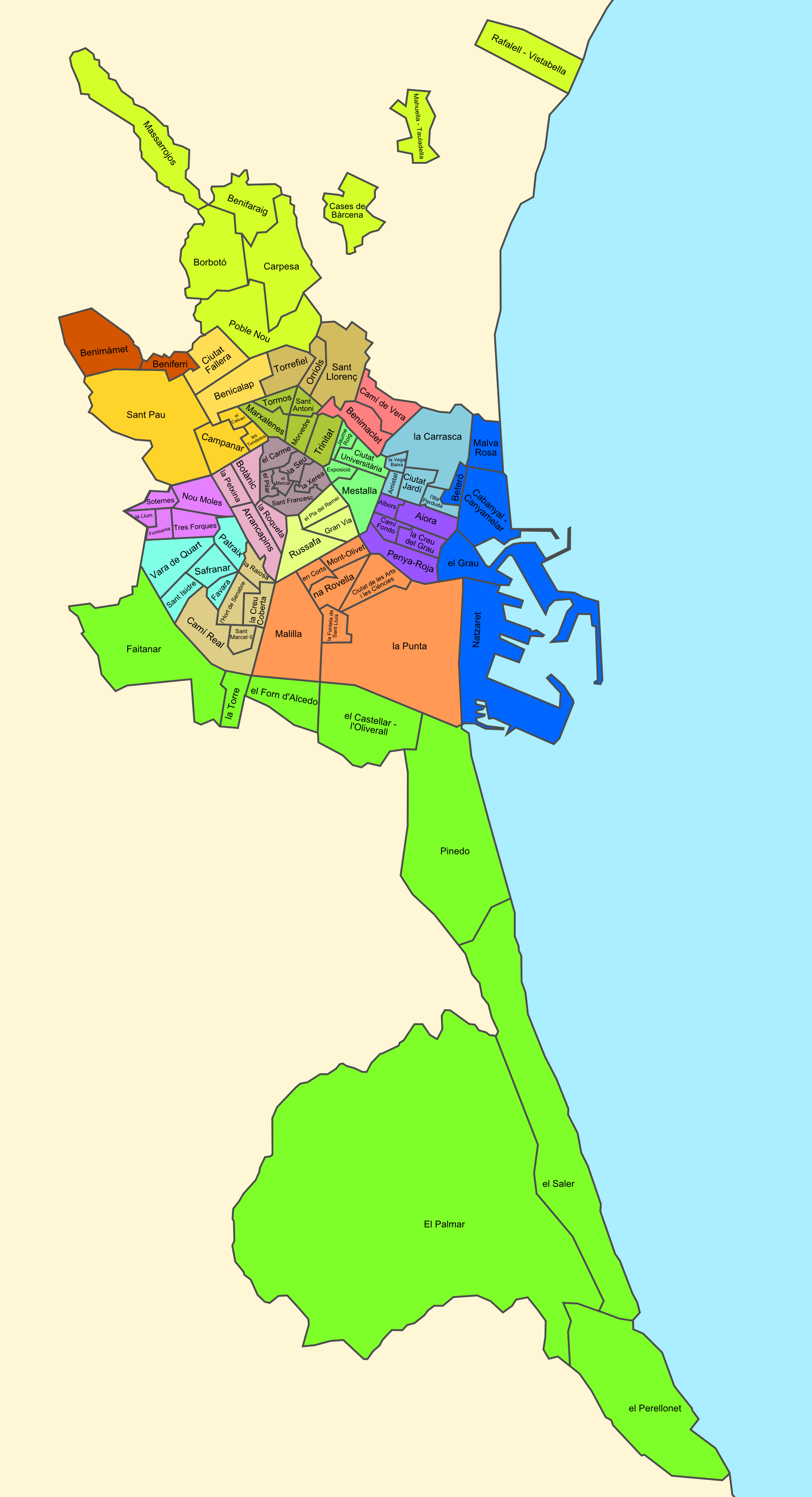 Barris de la ciutat de València acolorits per districtes.